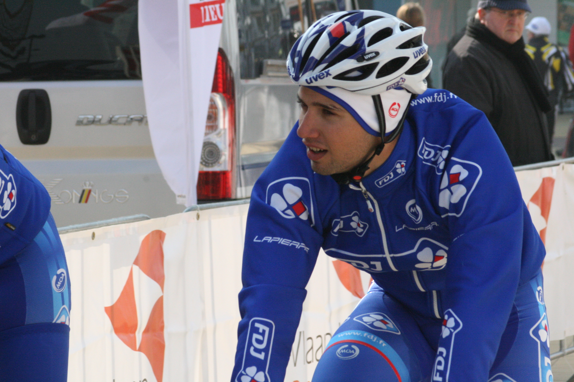 Driedaagse van West-Vlaanderen 2011, proloog in Middelkerke